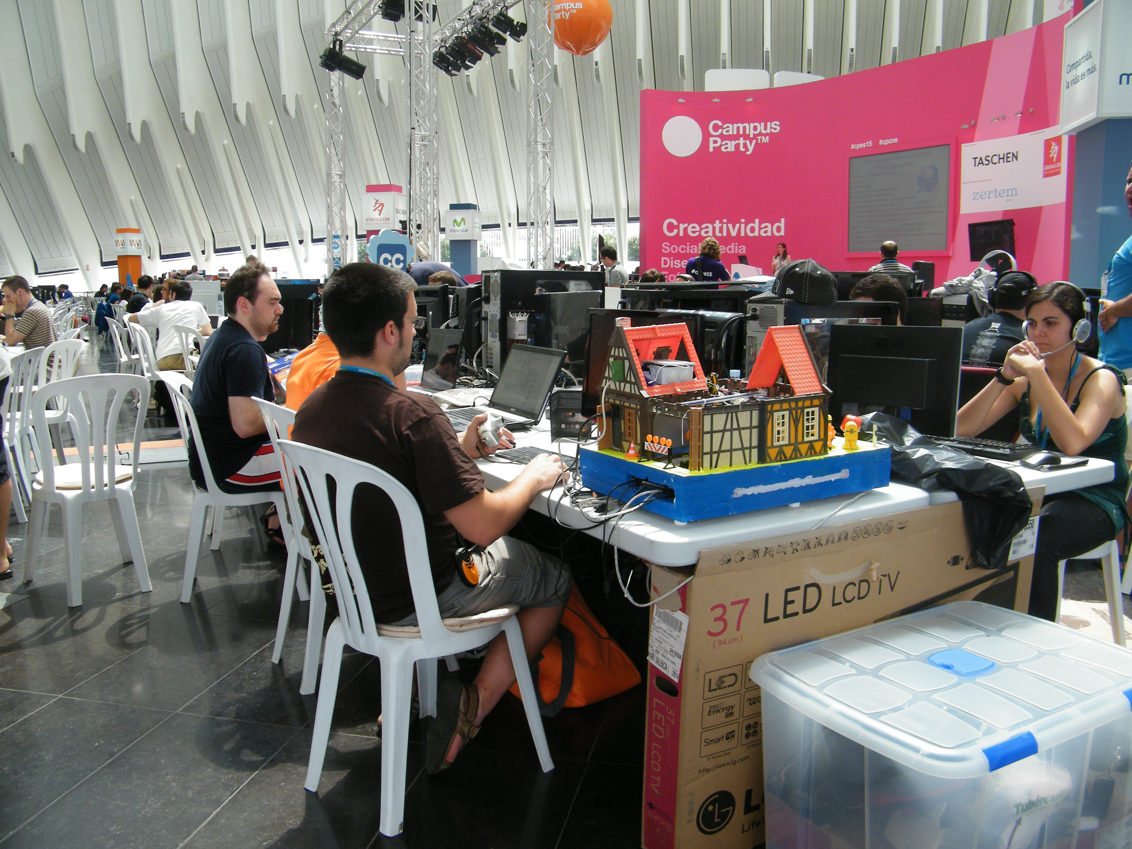 Campus Party de España en julio de 2011 en Valencia.